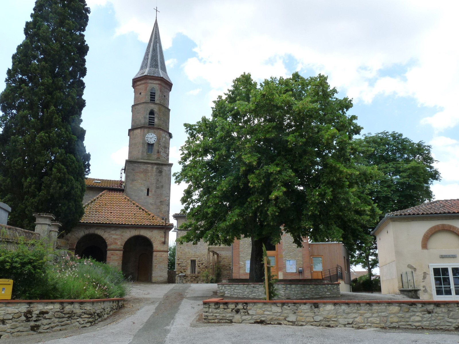 Centre-village, La Salvetat-Lauragais, Haute-Garonne, France